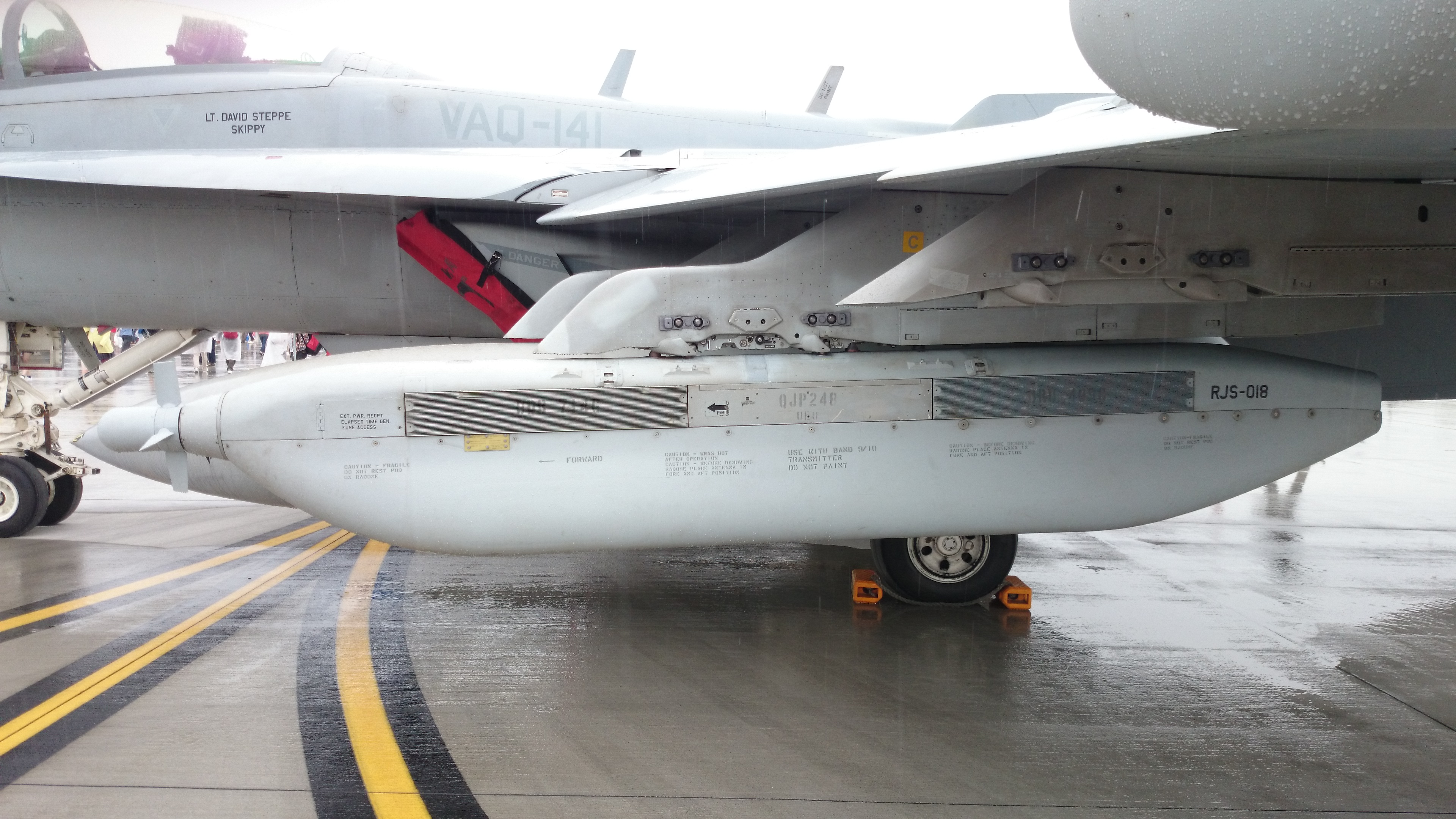 米海軍 EA-18G電子戦機（No.166931、VAQ-141電子戦飛行隊所属） 左主翼下のAN/ALQ-99F戦術妨害装置（TJS）。 2015年5月3日 米海兵隊岩国航空基地にて。